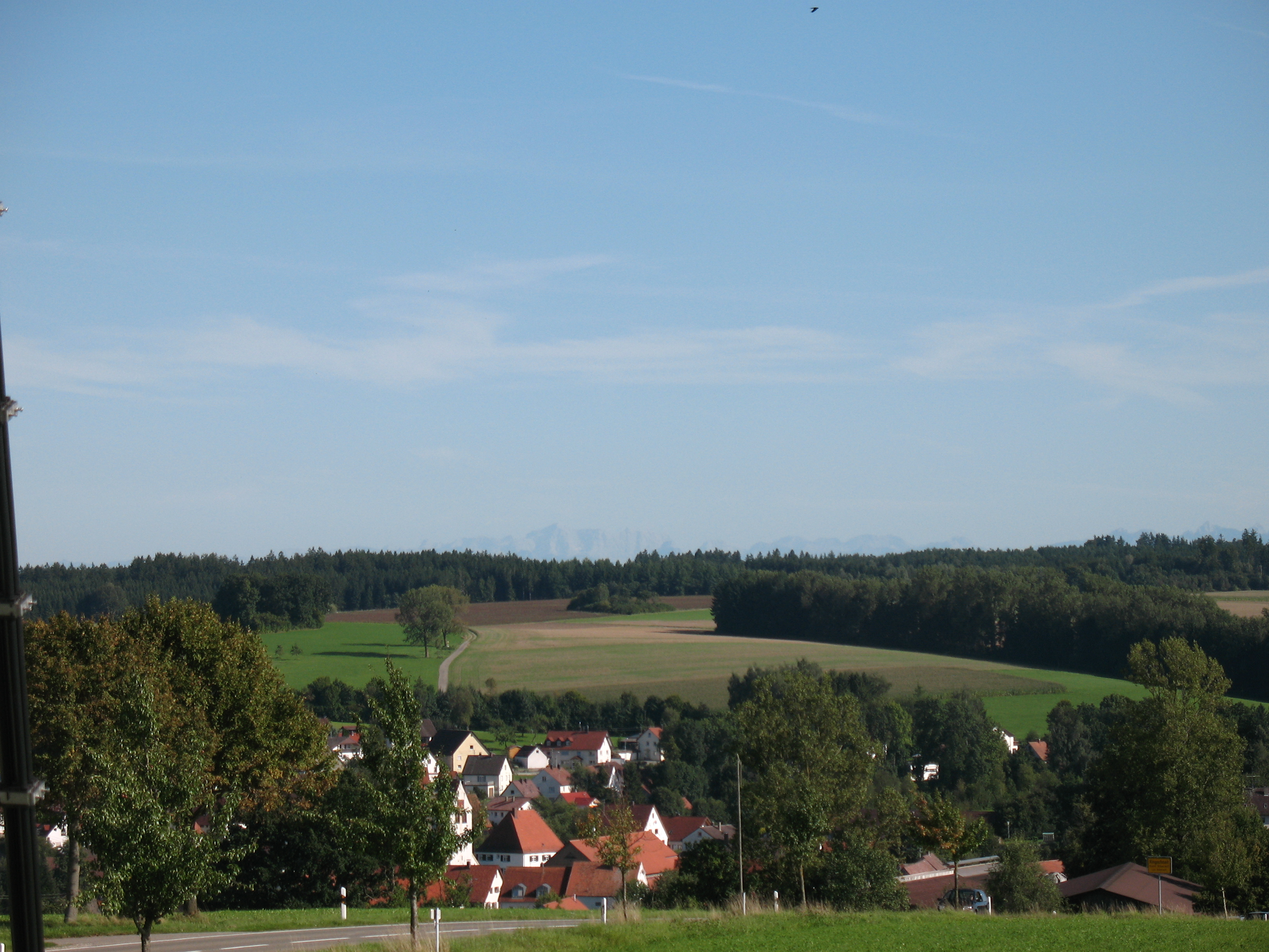 Ringschnait mit Zugspitze im Hintergrund.